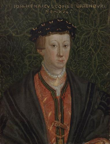 Künstler: anonym Kopie nach: Hans Besser Aachen - nach 1556 Heidelberg Künstler: Meister der Pfalz- und Markgrafen Mitte 16. Jahrhundert tätig Gemälde: Johann Heinrich III. Graf zu Ortenburg, gestorben 1568 s.d. Papier auf Holz 13,5 x 10,1 cm Kunsthistorisches Museum Wien, Gemäldegalerie Inv.-Nr. GG_5311 Abgebildete Person: Johann III. Sohn d. Alexander von Ortenburg